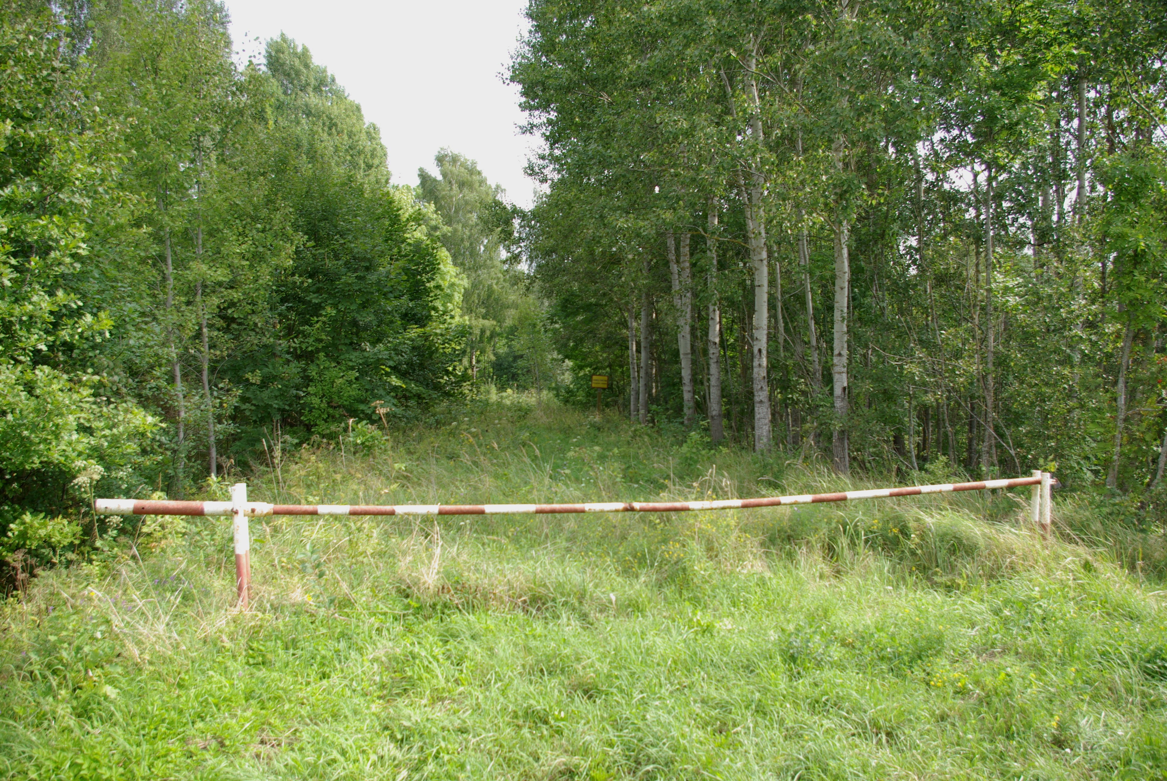 Polnisch-russische Grenze zwischen Rapa (Angerapp, 1938-1945: Kleinangerapp) im polnischen Powiat Gołdapski und Osjorsk (Darkehmen, 1938: Darkheim, 1938-1945: Angerapp) in der russischen Oblast Kaliningrad